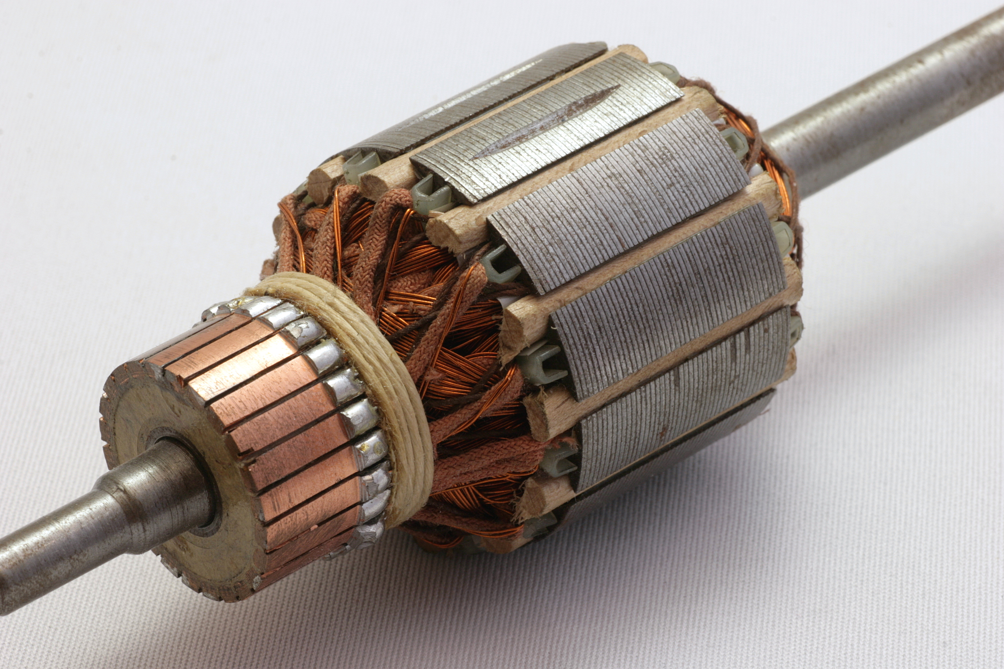 Rotor from a universal motor from a vacuum cleaner. (Anker eines Universalmotors aus einem Staubsauger. Wicklungen etc. wurden von Hand neu gemacht.)